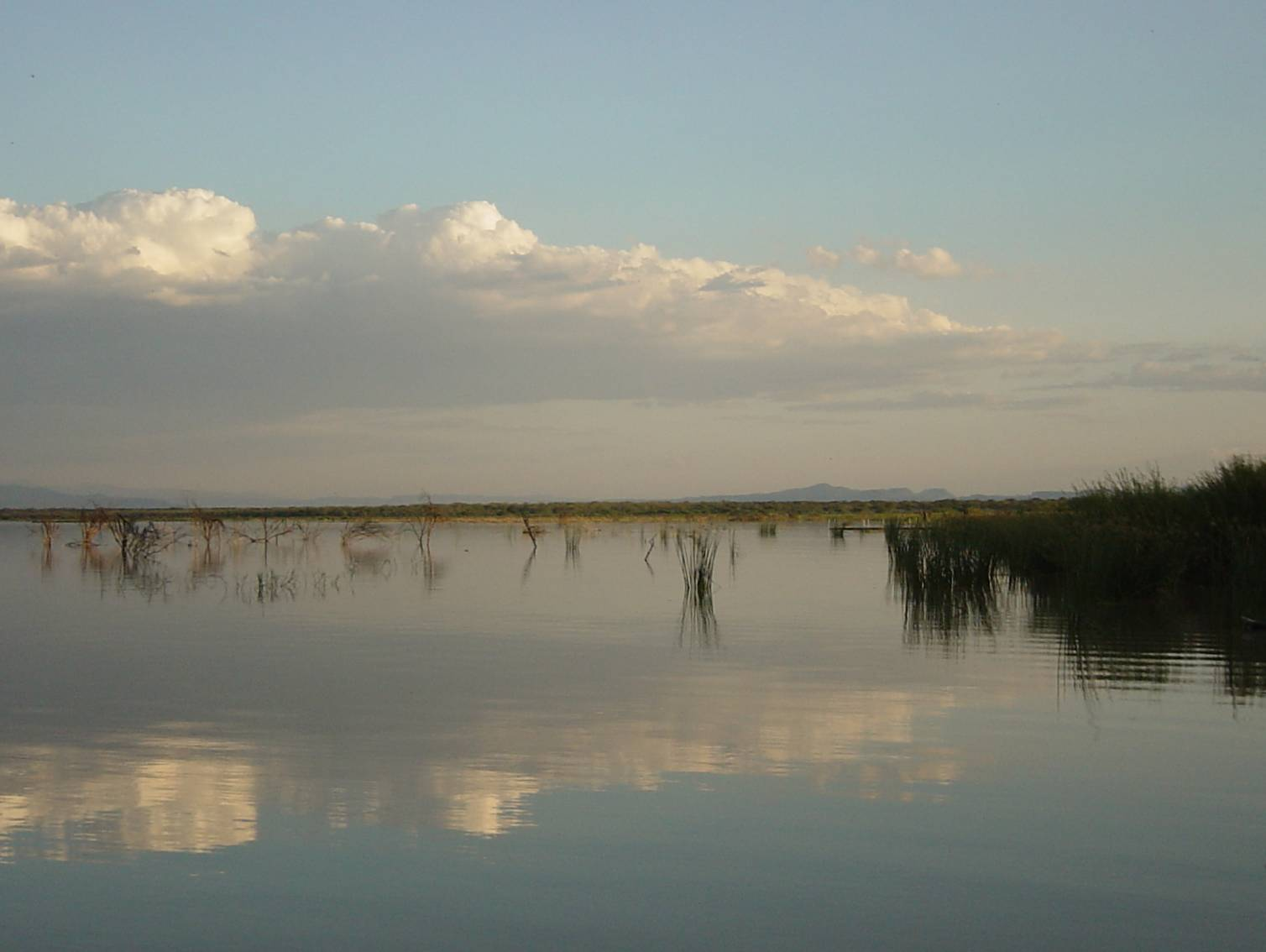 Lake Baringo